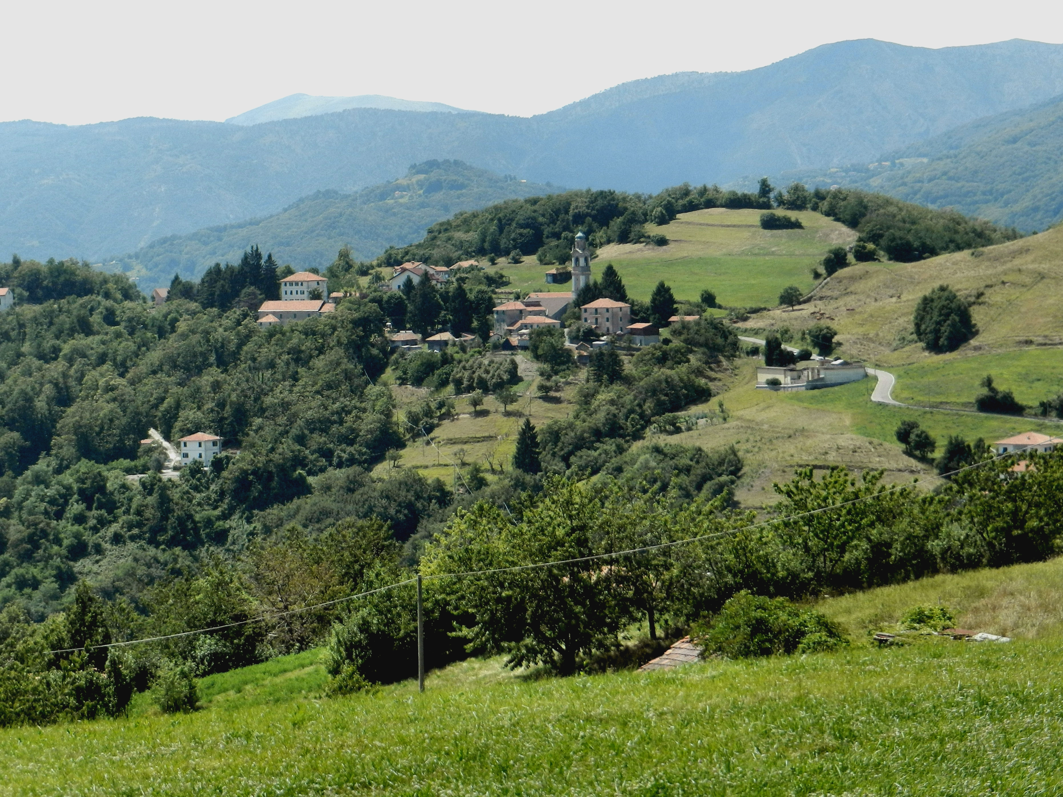 Serra Riccò, città metropolitana di Genova, frazione Serra